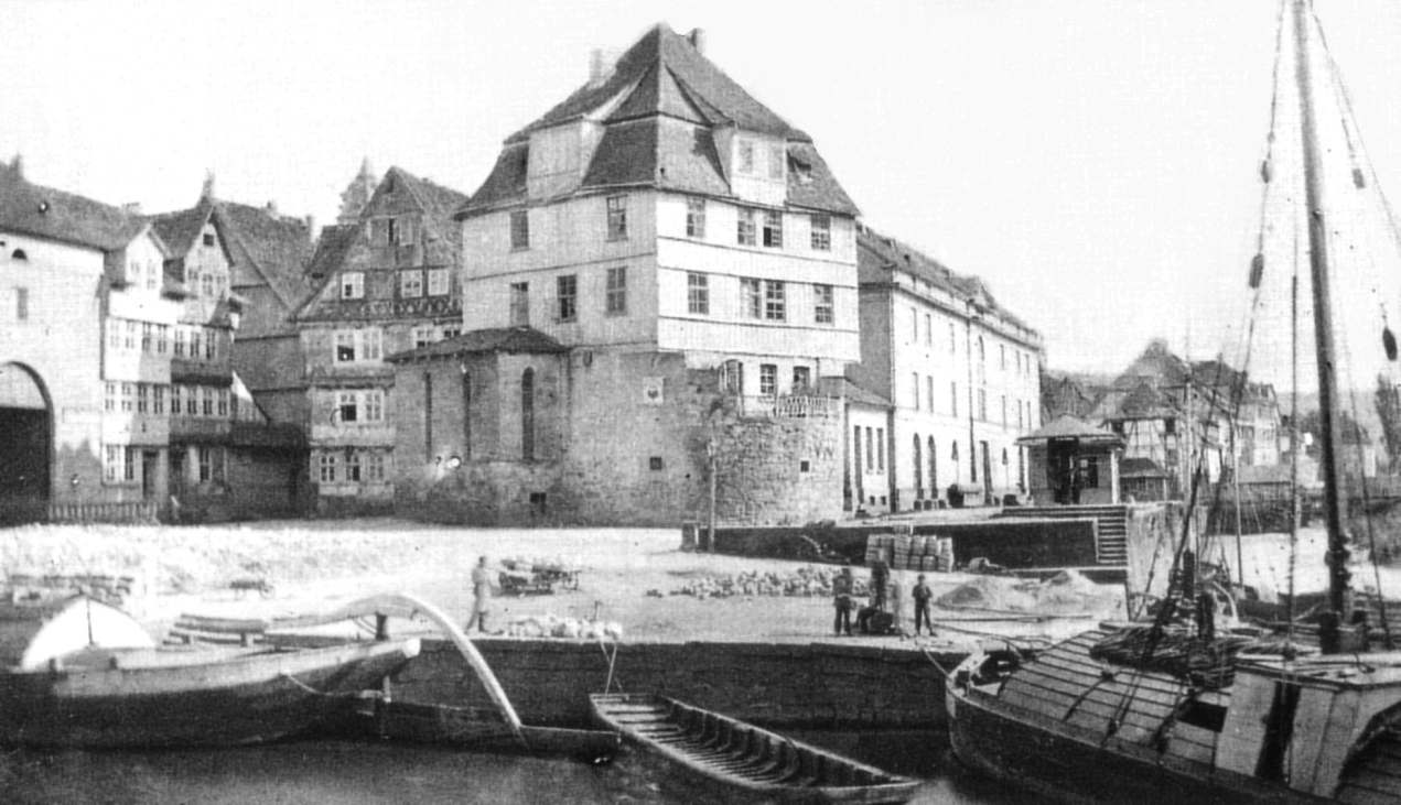 Schlagdspitze mit Bremer und Wanfrieder Schlagd in Münden und Altes Sydekum, links davon der Packhof, rechts davon der Alte Packhof